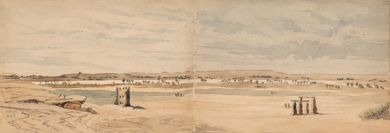 Baq`a's Salt flat